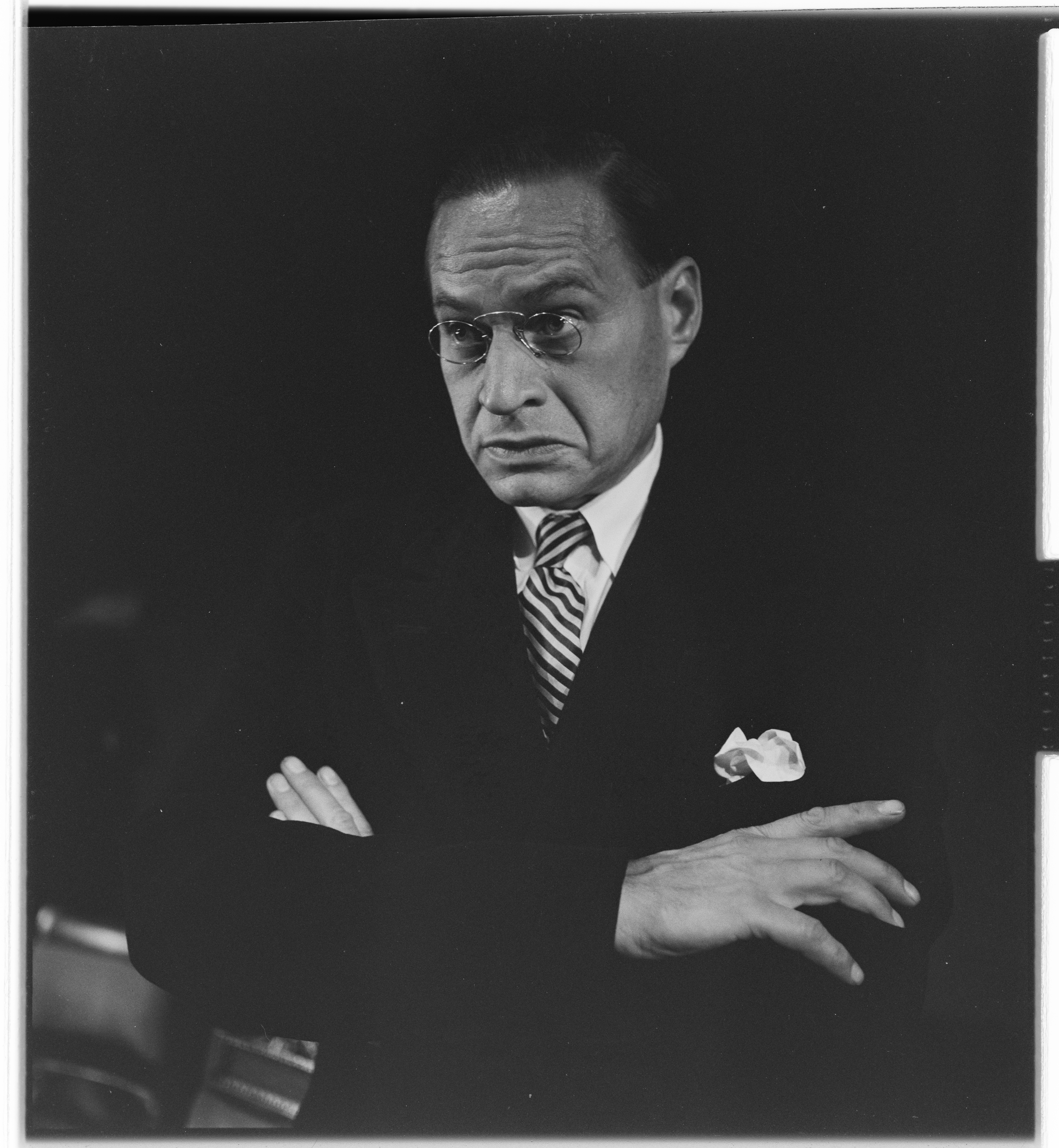 Bildet er hentet fra Arkivverket. Herren og hans tjenere, Nationaltheatret. Arkivinstitusjon : Riksarkivet Arkivnavn : Billedbladet NÅ Sted : Norge, Oslo, Oslo, Nationaltheatret Emneord: teater, skuespillere Depicted person: Carl Børseth Rasmussen